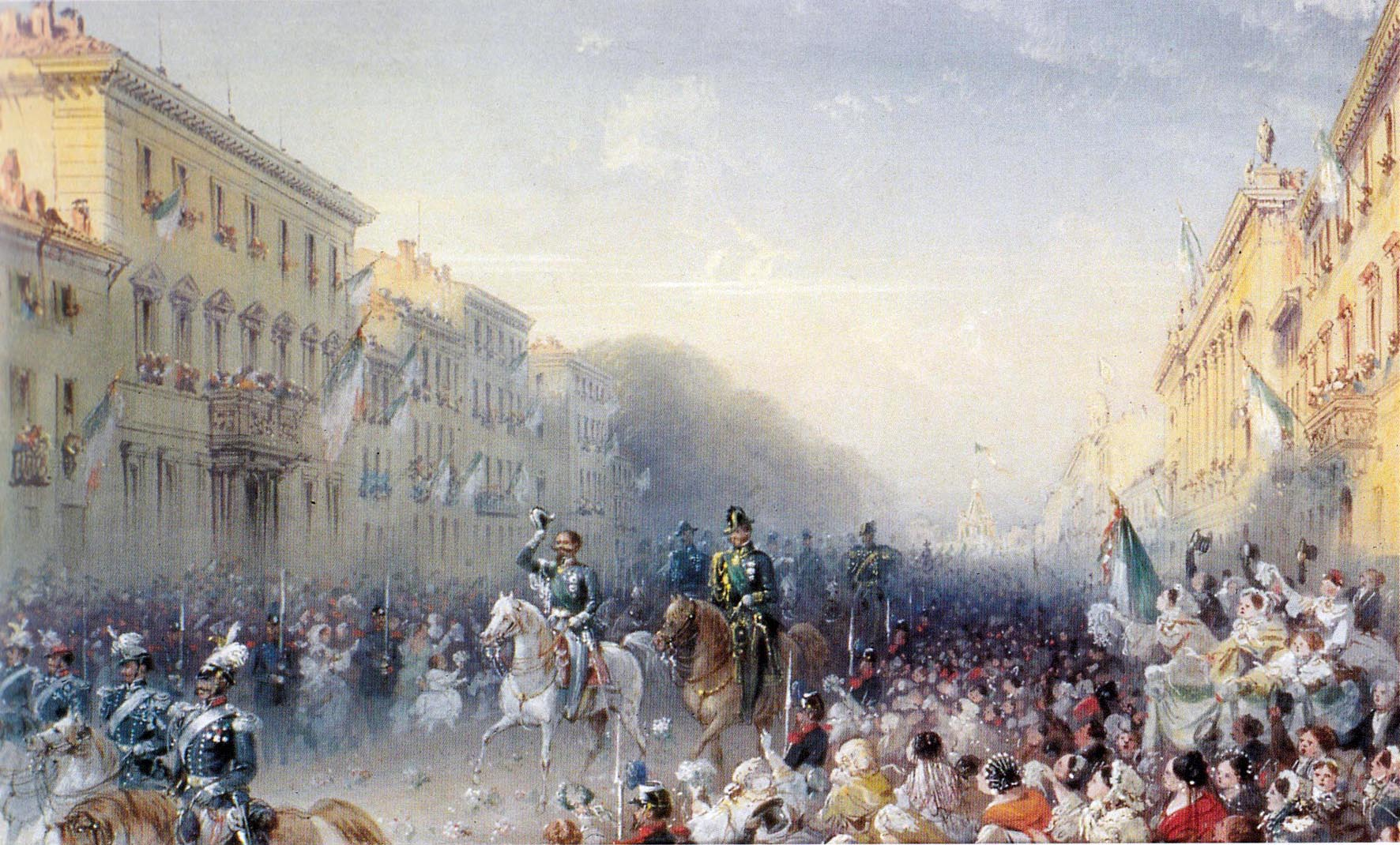 entrata di Vittorio Emanuele II a Milano